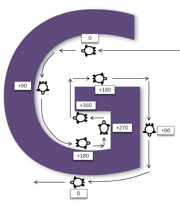 Verhalten des Pledge-Algorithmus beim Durchwandern eines "G". Dabei werden Drehungen im Gegenuhrzeigersinn positiv, Drehungen im Uhrzeigersinn negativ gezählt.